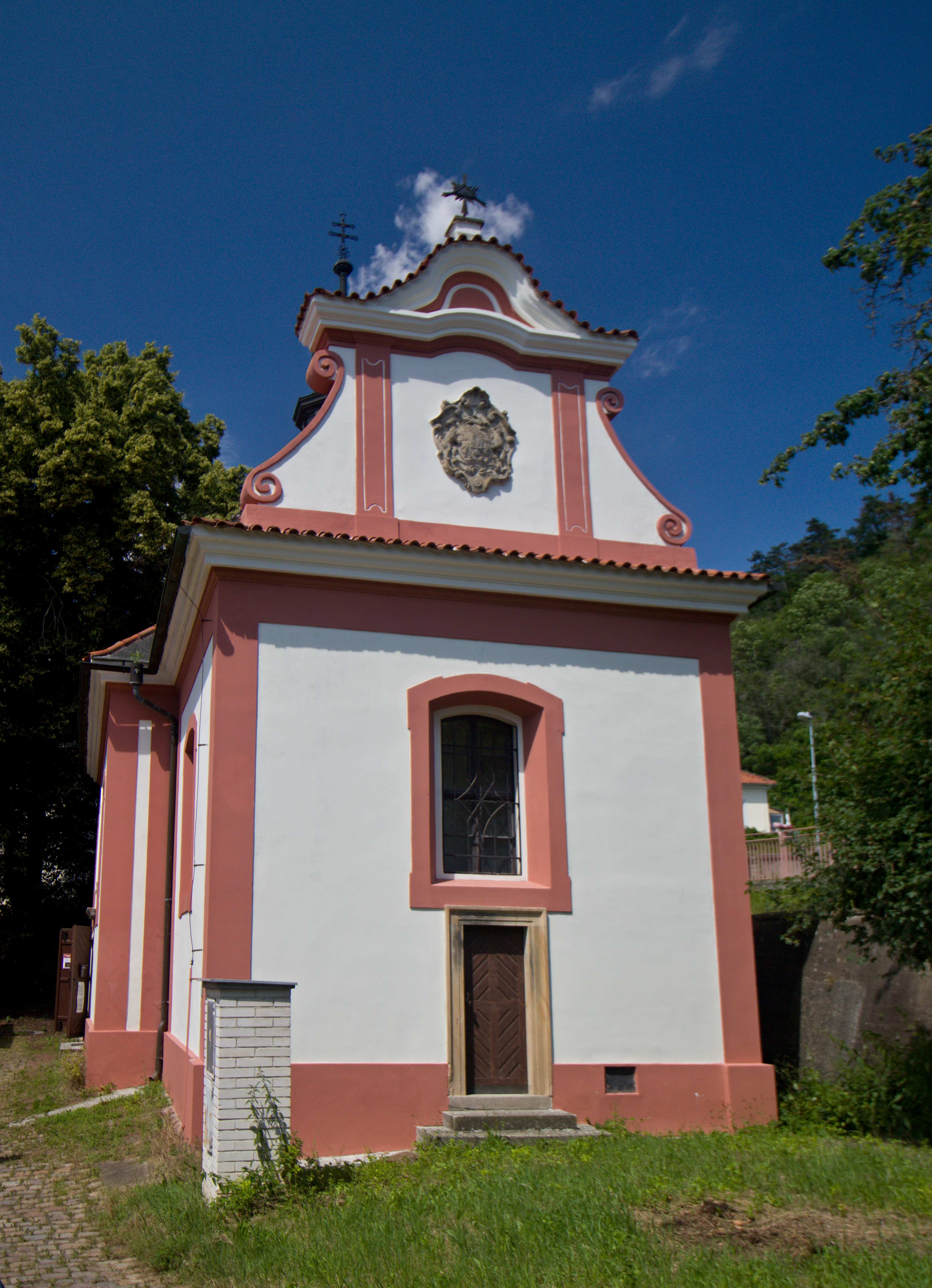 Praha-Malá Chuchle, chrám Narození Panny Marie